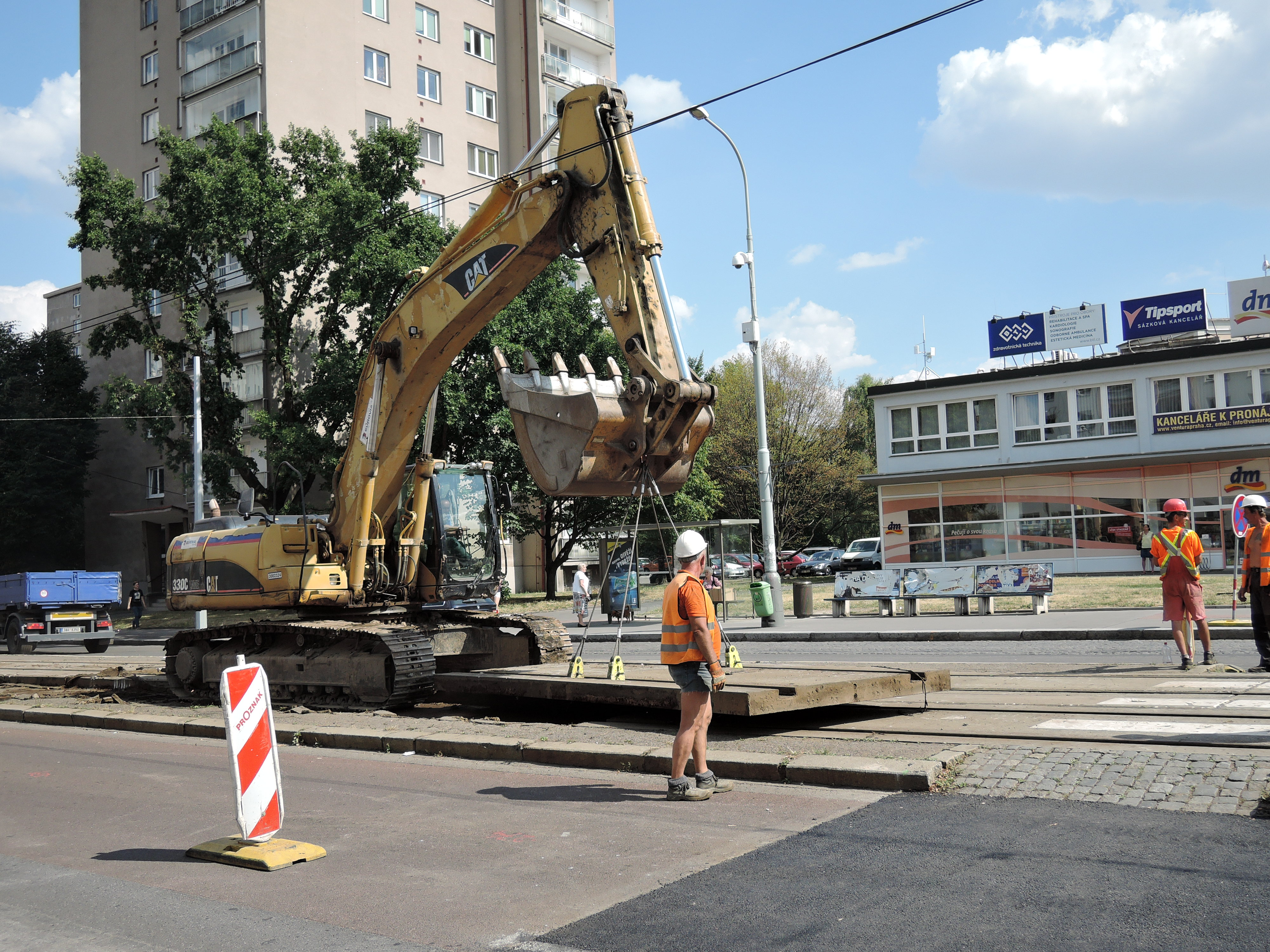 Praha, Petřiny, rekonstrukce tramvajové trati Vozovna Střešovice – Petřiny